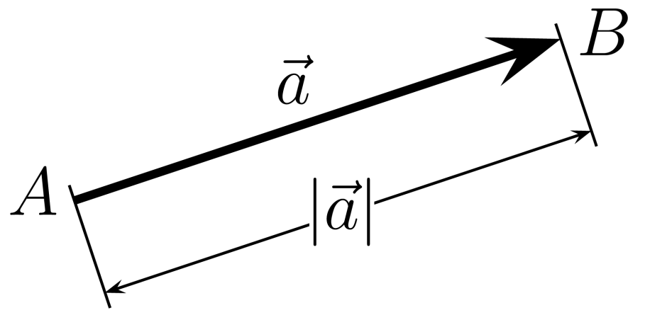 Vektor zwischen zwei Punkten A und B